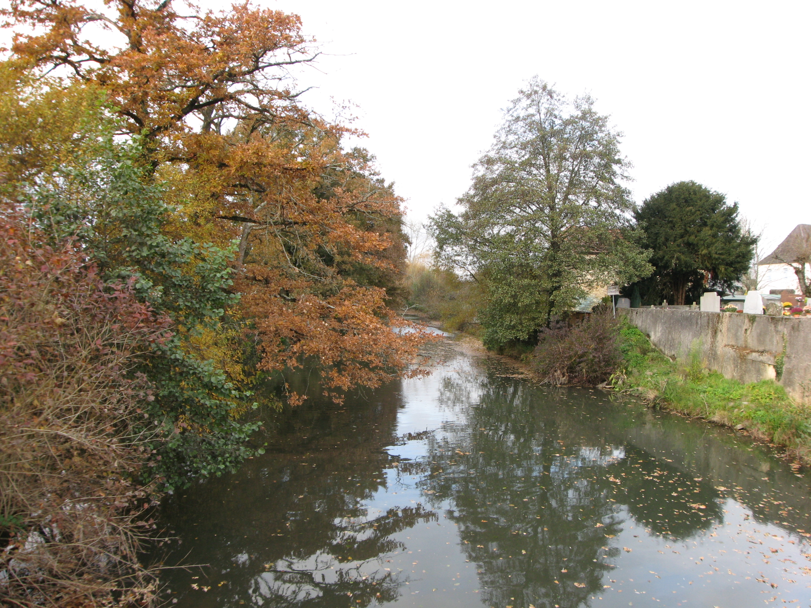 Le Joos à Géronce (Pyrénées-Atlantiques) (Pyrénées), qui passe juste à coté du cimetière.